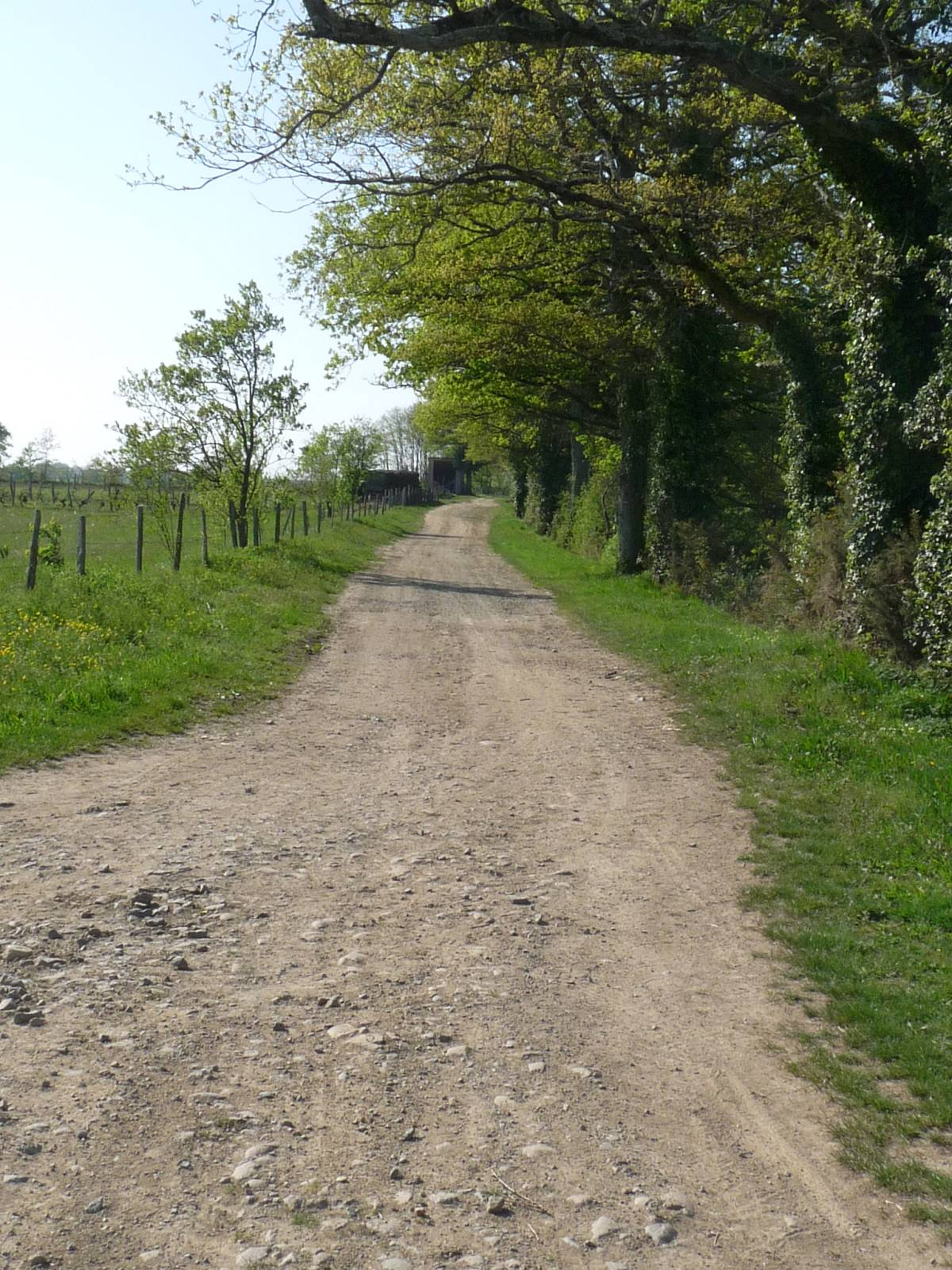 Voie d'Agrippa Saintes-Lyon vue vers l'ouest, croisement avec la D.164, Suris, Charente, France